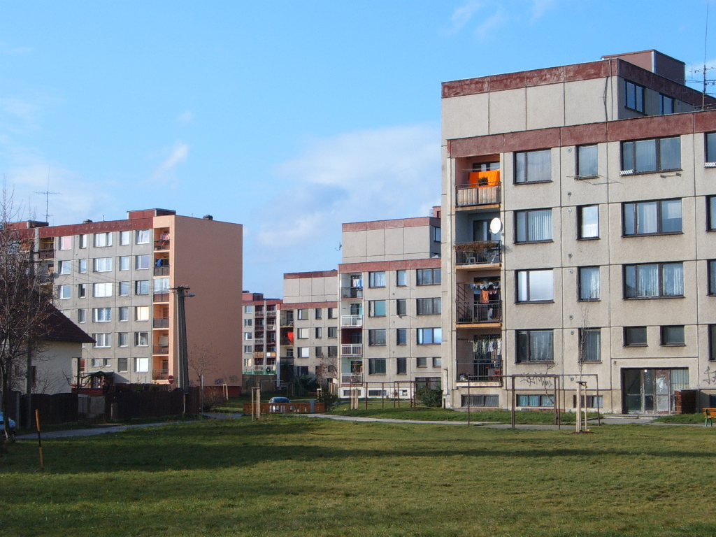 dubina